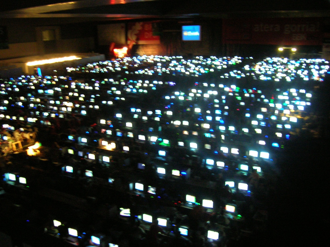 Foto de la Euskal Encounter 2006